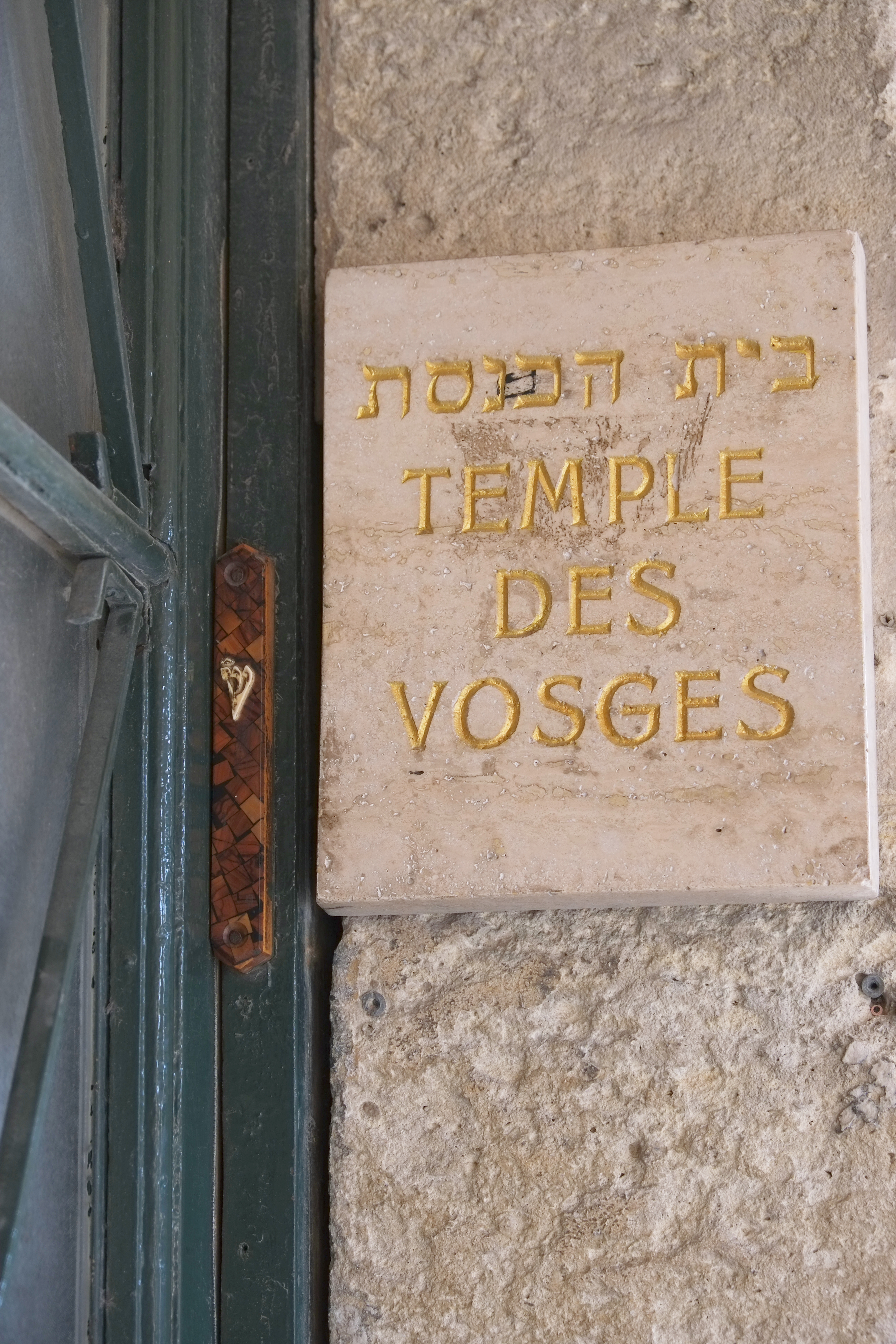 Synagoge der Rue des Tournelles in Paris, Eingang Place des Vosges